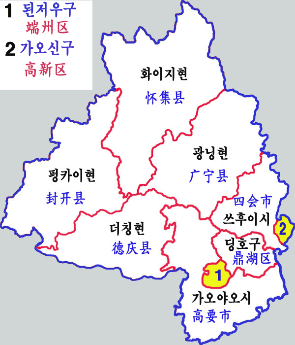 자오칭시 현급구역도